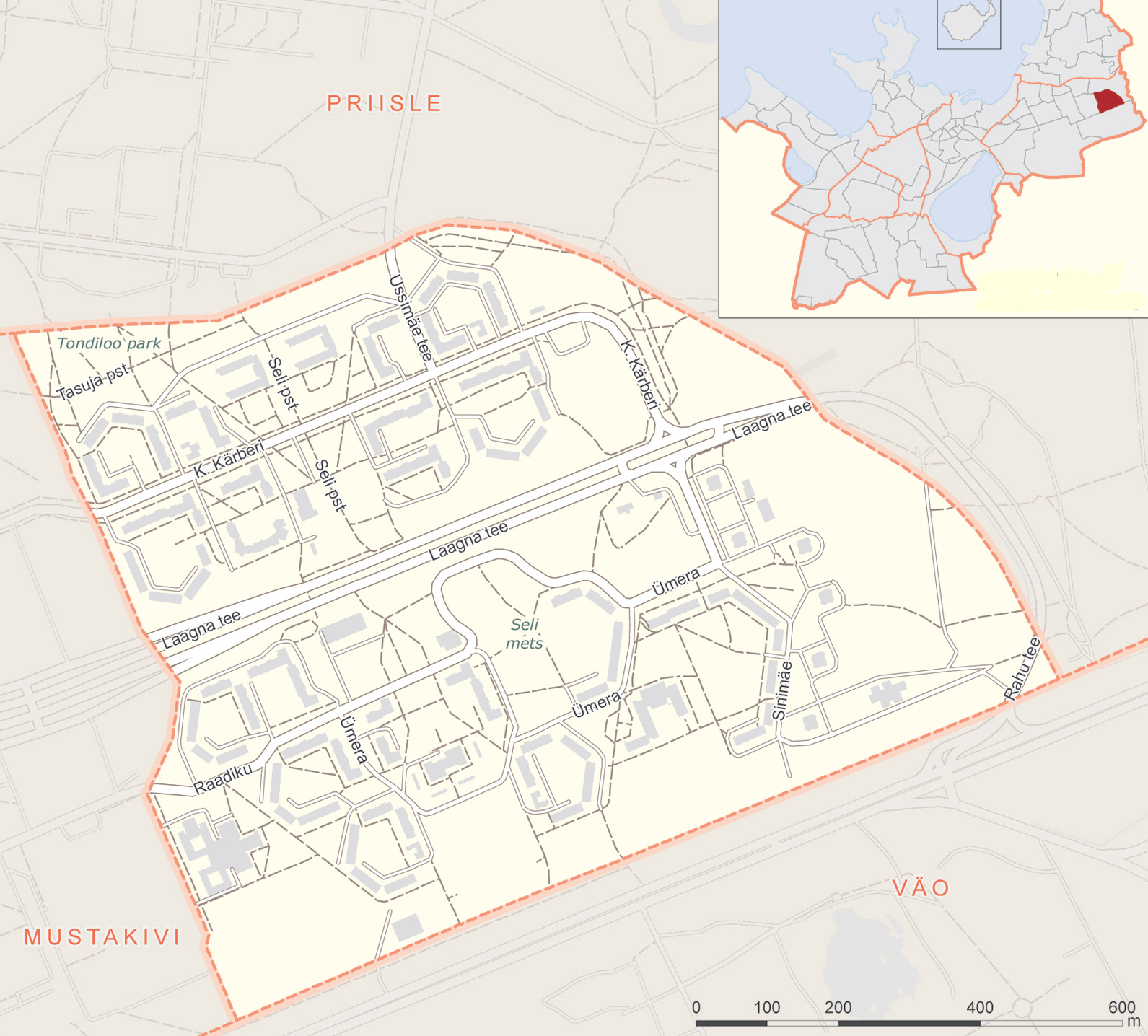 Seli asumi kaart